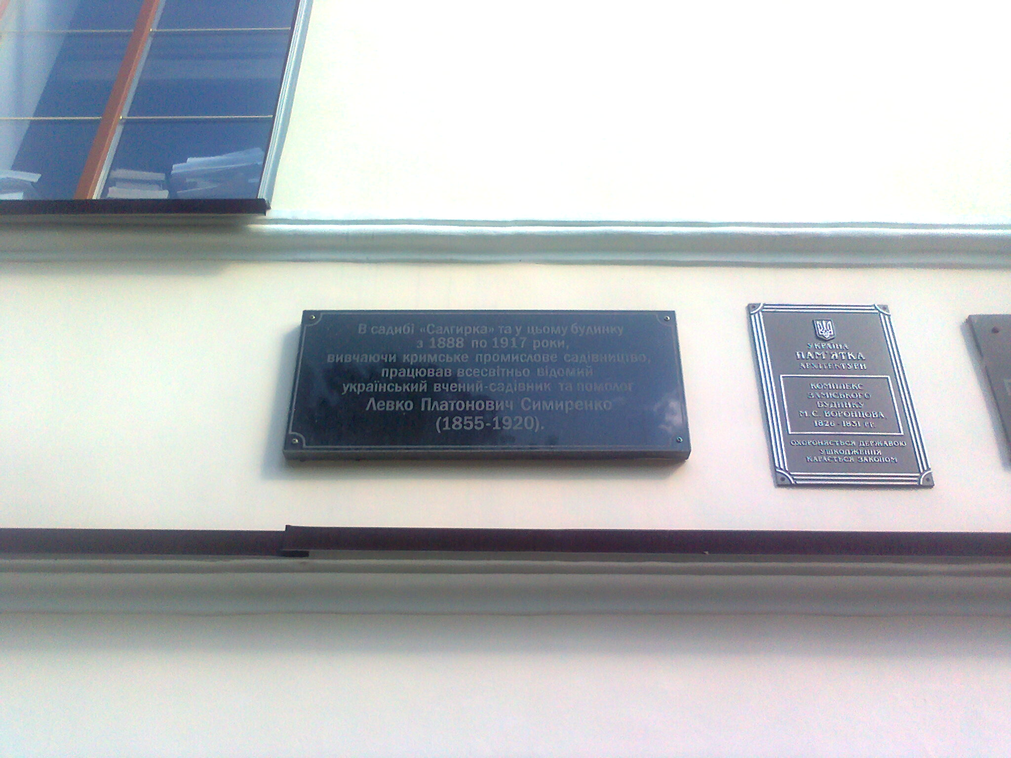 Памятные таблички в Симферополе